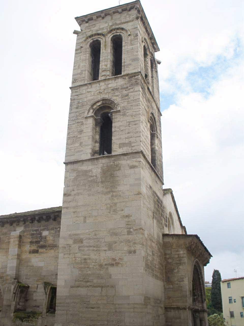 Tudela - Iglesia de la Magdalena